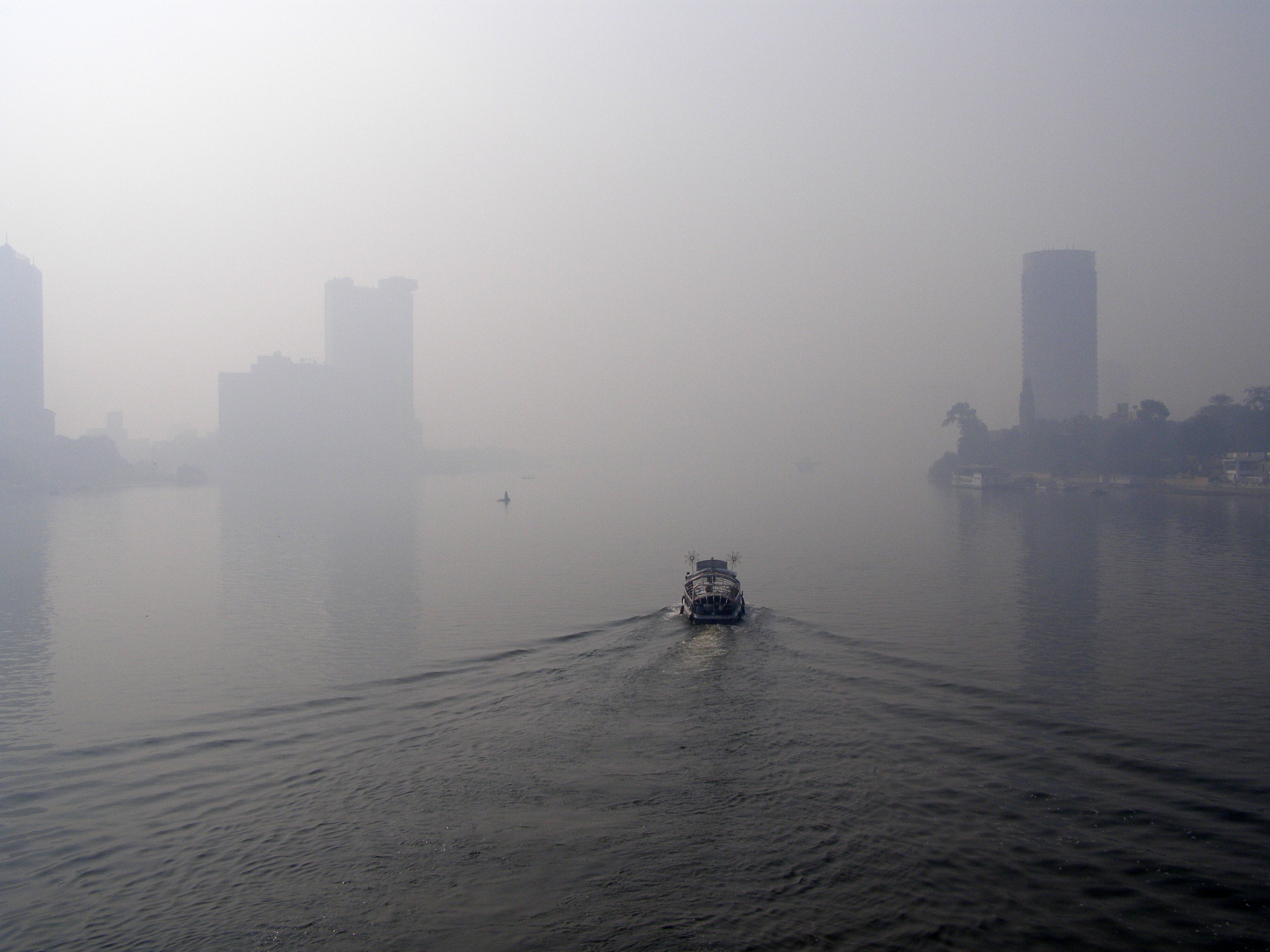 Pollution - Le Nil vu du pont du 6 Octobre - Le Caire - Egypte